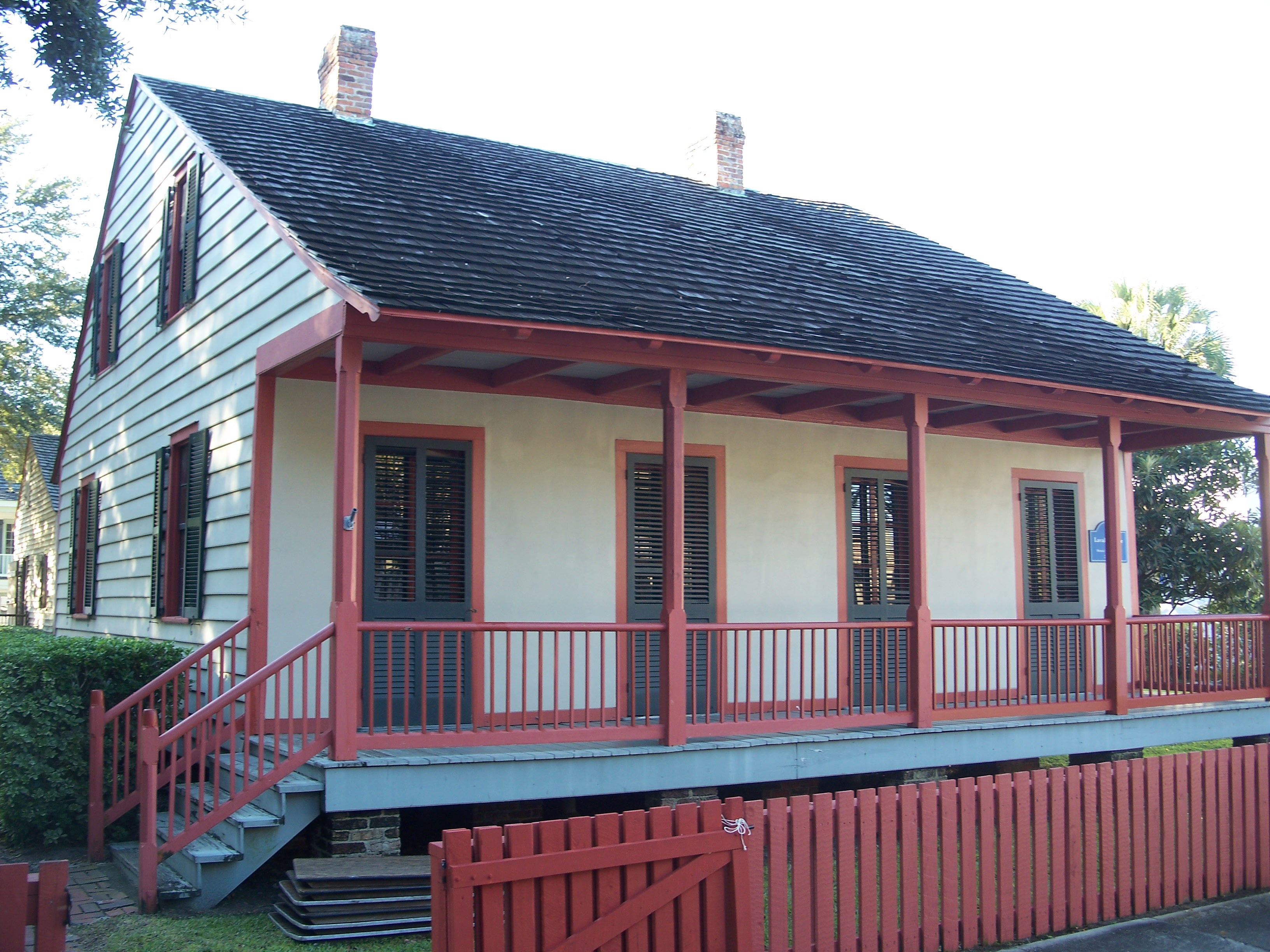 Pensacola, Florida: Lavalle House